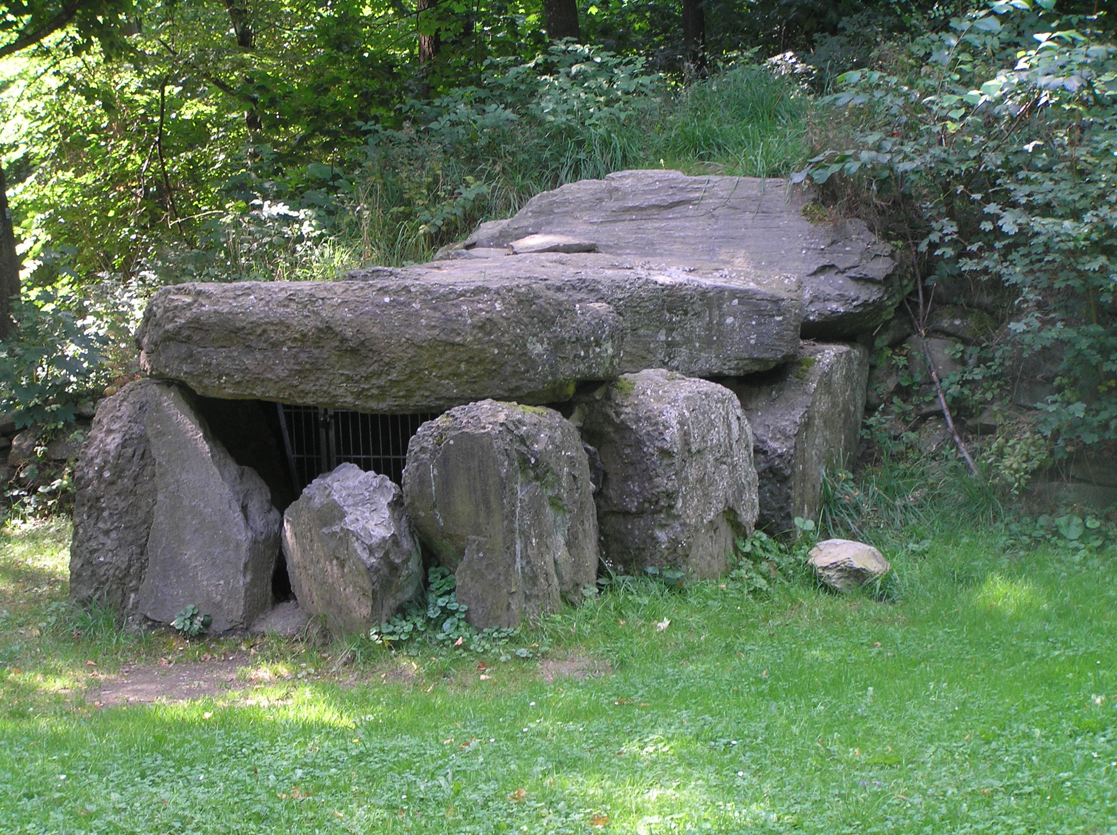 Steinkistengrab aus Oberzeuzheim, Erstellt Ende der Jungsteinzeit ca. 2500 bis 1800 vor Christus. Das Grab wurde 1985 in Oberzeuzheim entdeckt. Form und Größe des Grabes sind unbekannt, da die Steine nicht mehr in Originallage aufgefunden wurden. Das dargestellte Grab ist eine Rekonstruktion des Grabes aus Originalsteinen im Burggarten von Hachenburg neben dem Landschaftsmuseum Westerwald.